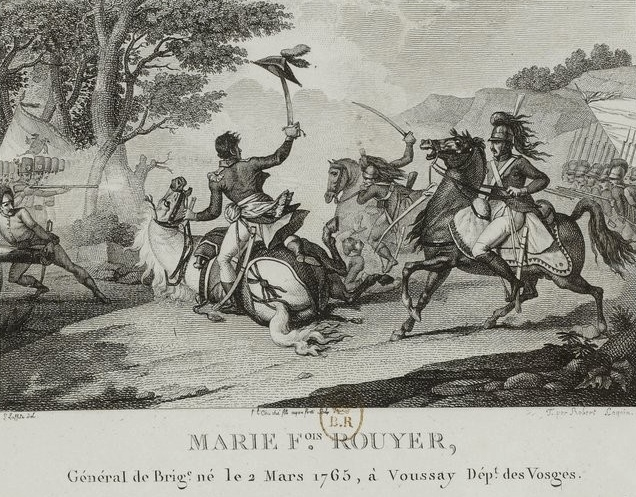 Marie François Rouyer (1765-1824), général de division et baron de l'Empire. Il est ici représenté à la bataille de Fleurus en 1794, chargeant à la tête d'un régiment d'infanterie pour reprendre un bois occupé par les Autrichiens.